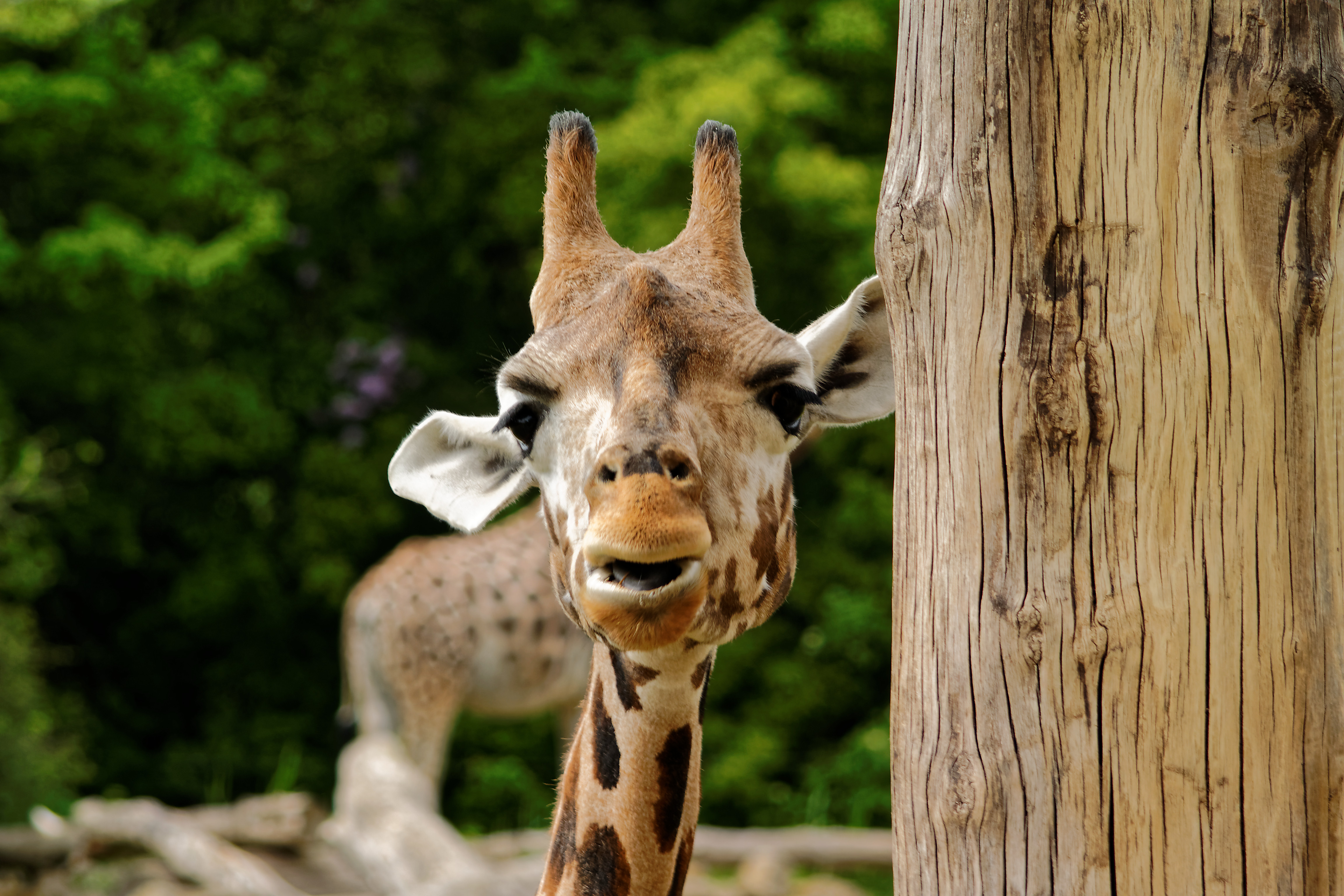 Giraffe im Zoo in Leipzig